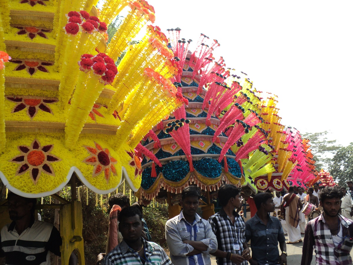 കൊടകര ഷഷ്ഠി- പൂക്കാവടി